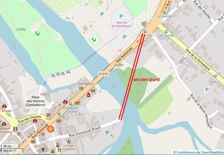 Tracé de l'ancien pont de Montbazon. This map may be incomplete, and may contain errors. Don't rely solely on it for navigation.